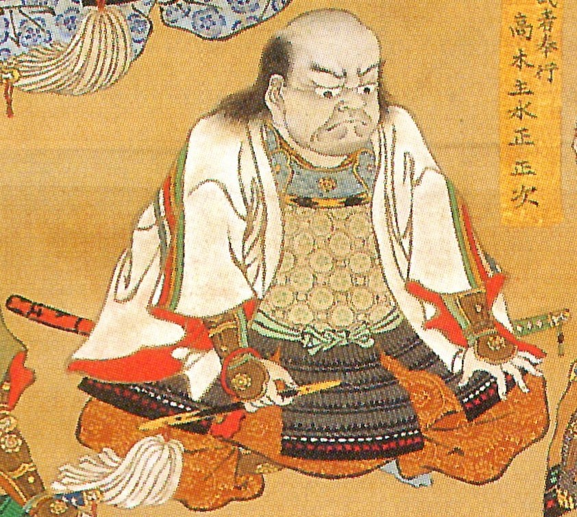 高木正次の肖像。